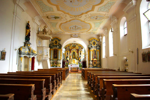 Wallfahrtskirche Stettkirchen (Markt Hohenburg, Landkreis Amberg-Sulzbach, Bayern)